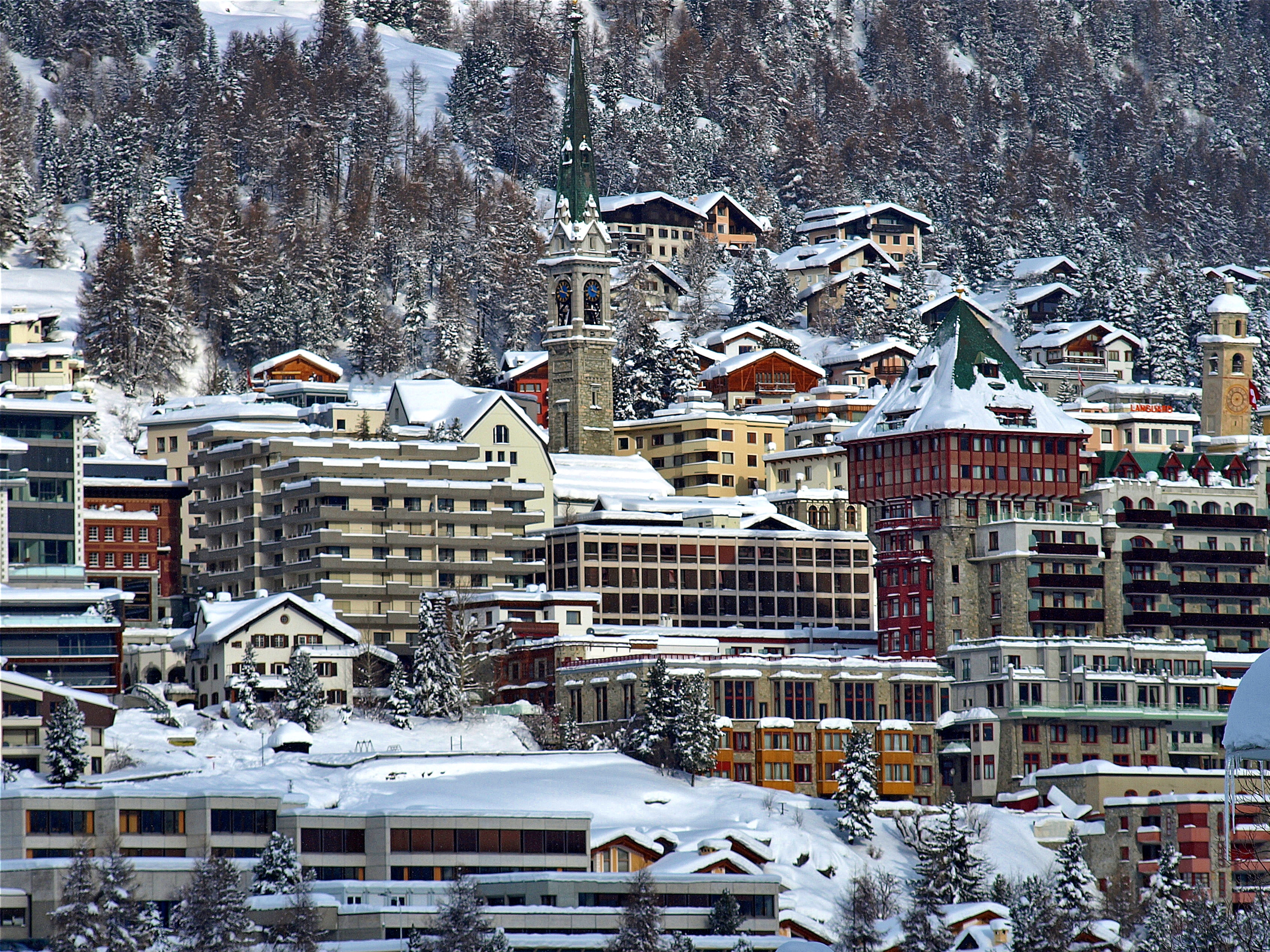 sankt moritz - switzerland